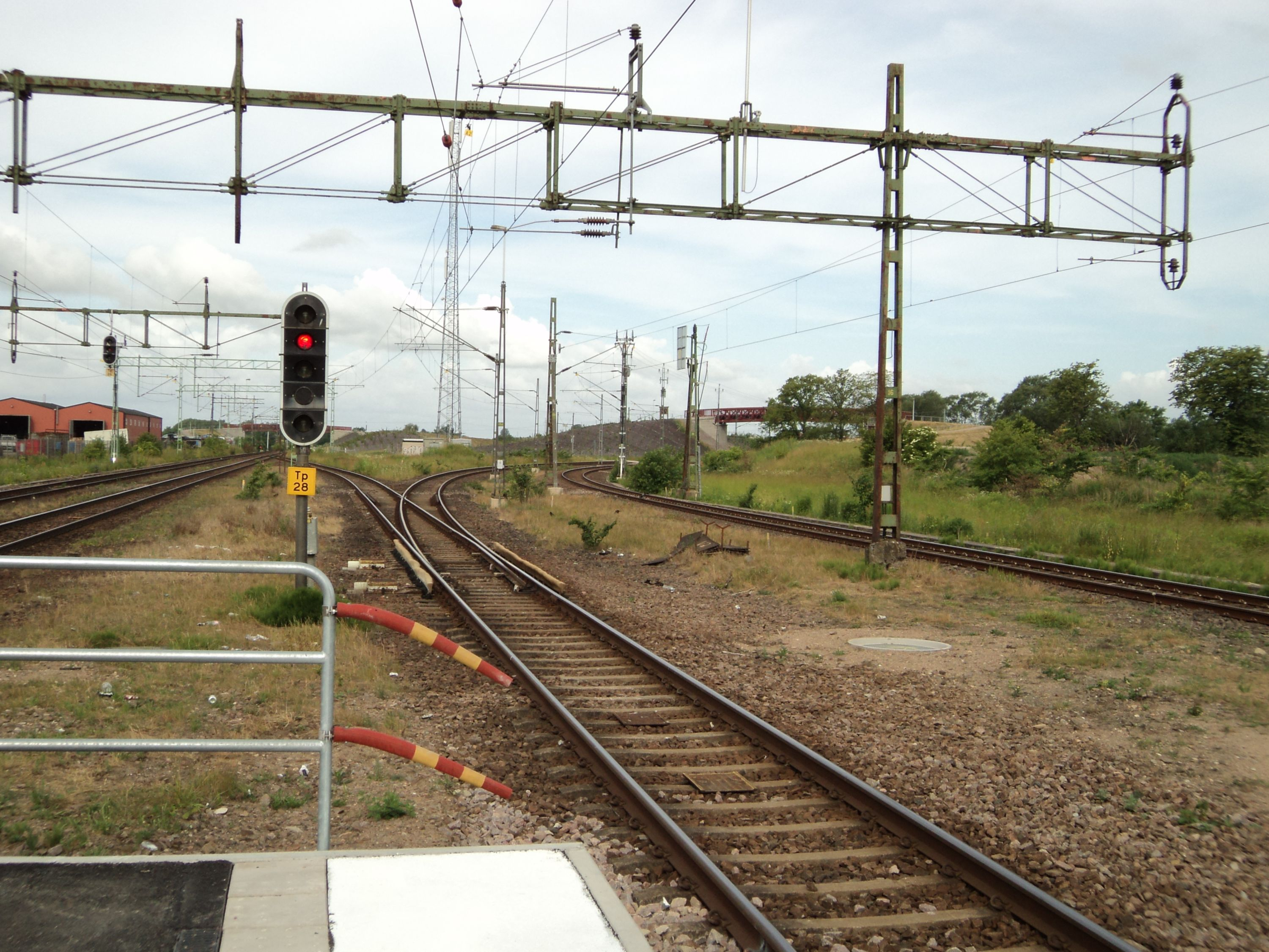 I Teckomatorp finns där två järnvägar. Till vänster syns Rååbanan mot Helsingborg och till höger gör Godsstråket genom Skåne en skarp sväng mot Åstorp och Ängelholm.